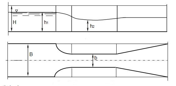 H-latako aukštis, h1 – vandens lygis prieš susiaurėjimą, h2 – vandens lygis sąsiauryje, B – latako plotis, b – sąsiaurio plotis